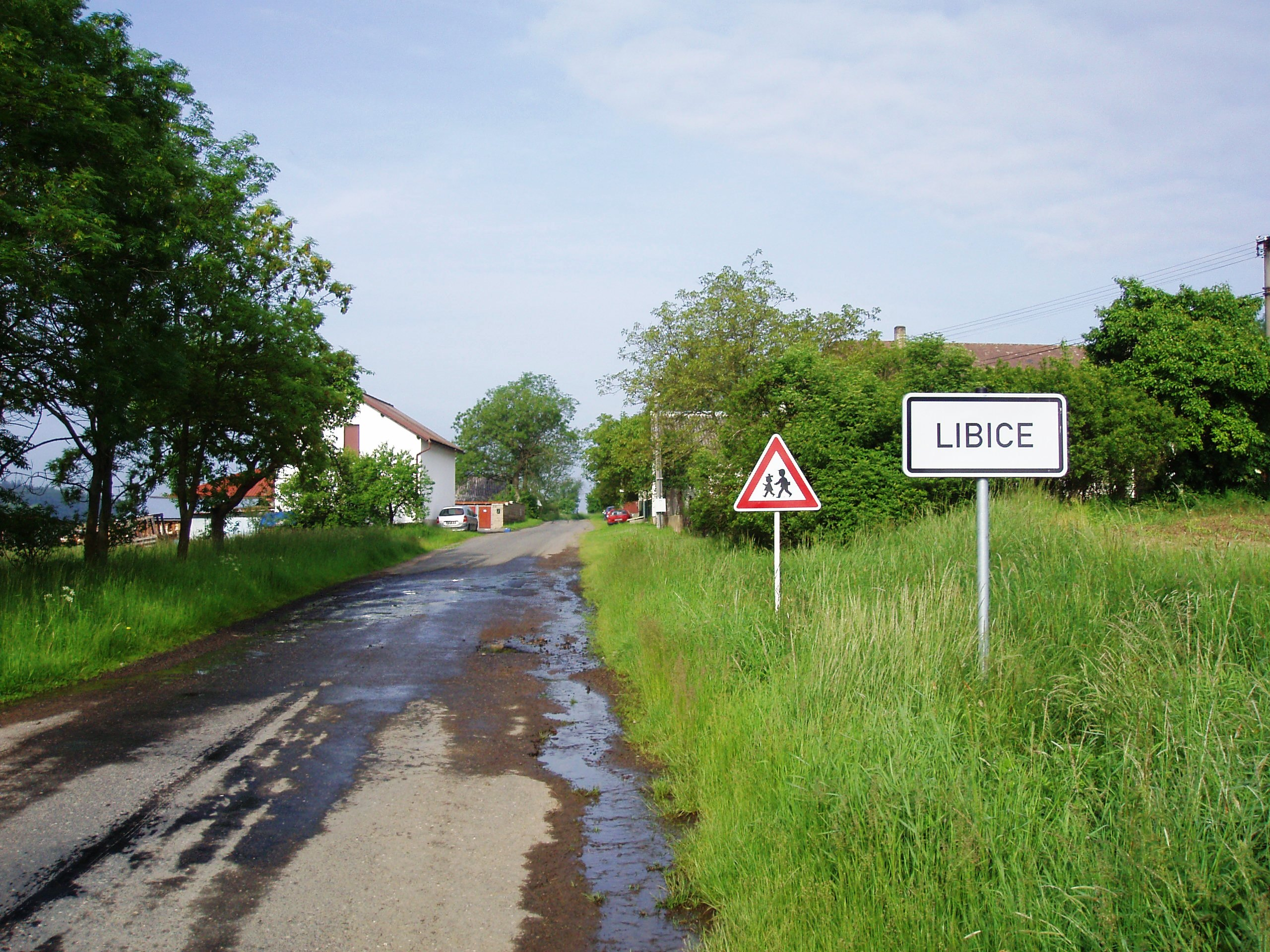 Libice